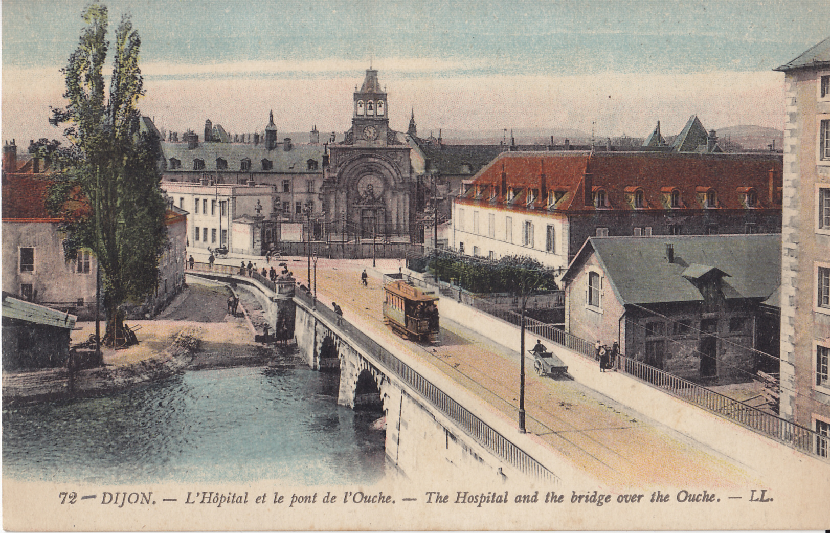 Carte postale ancienne éditée par LL, n°72 :DIJON - L'hôpital et le Pont de l'Ouche